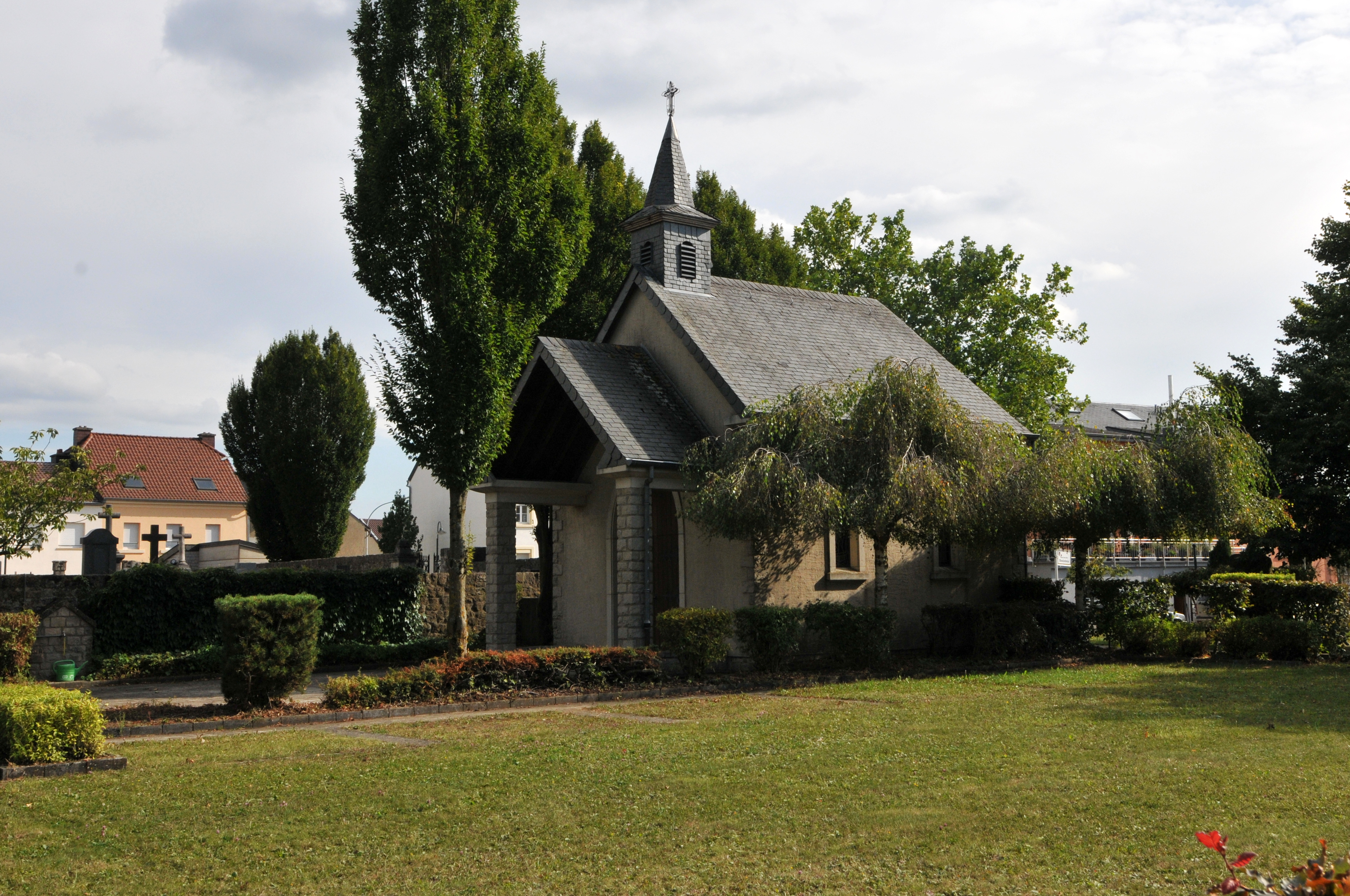 D'Kapell um Kierfecht zu Elveng.